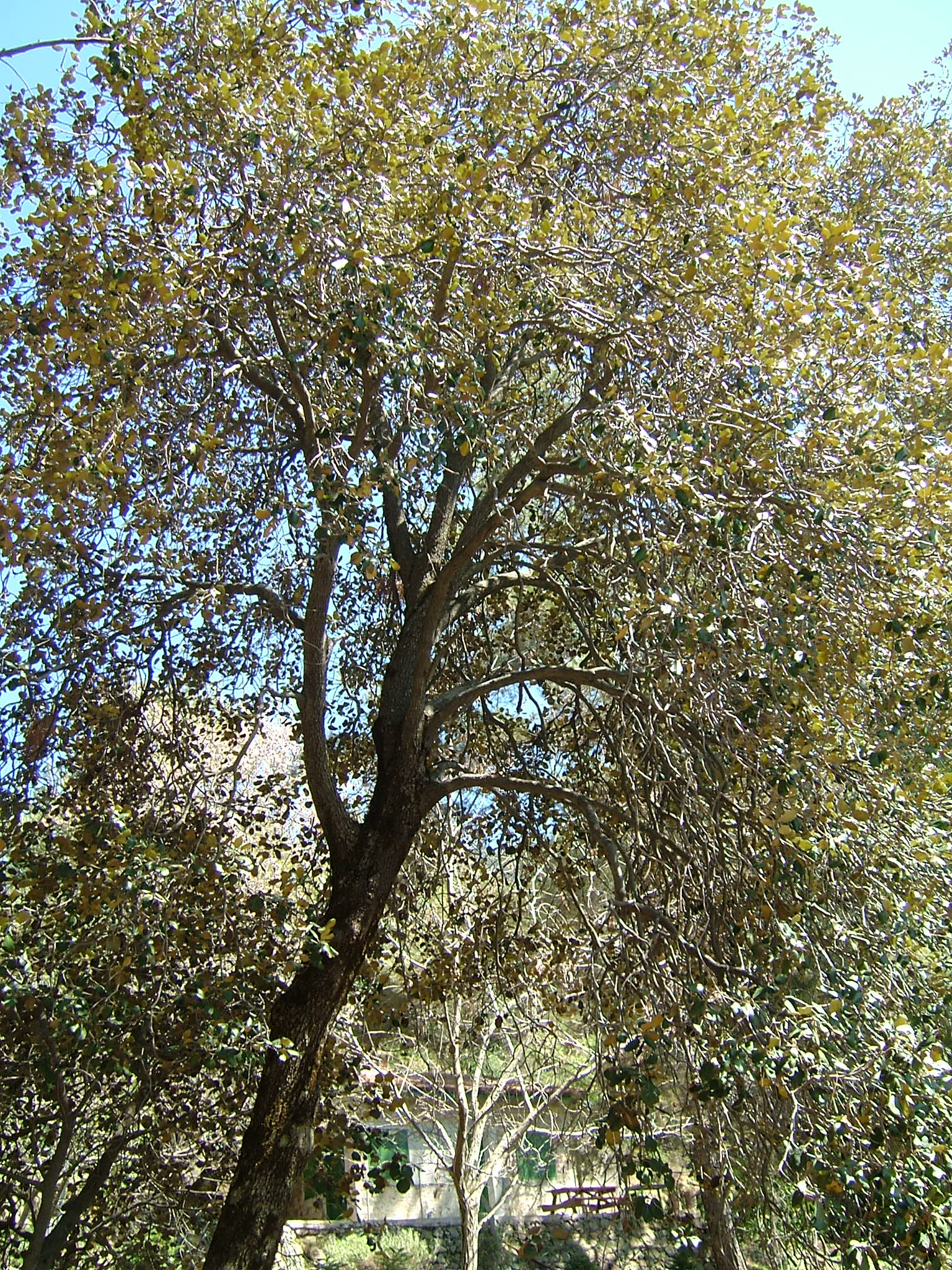 A golden oak (Quercus alnifolia) tree